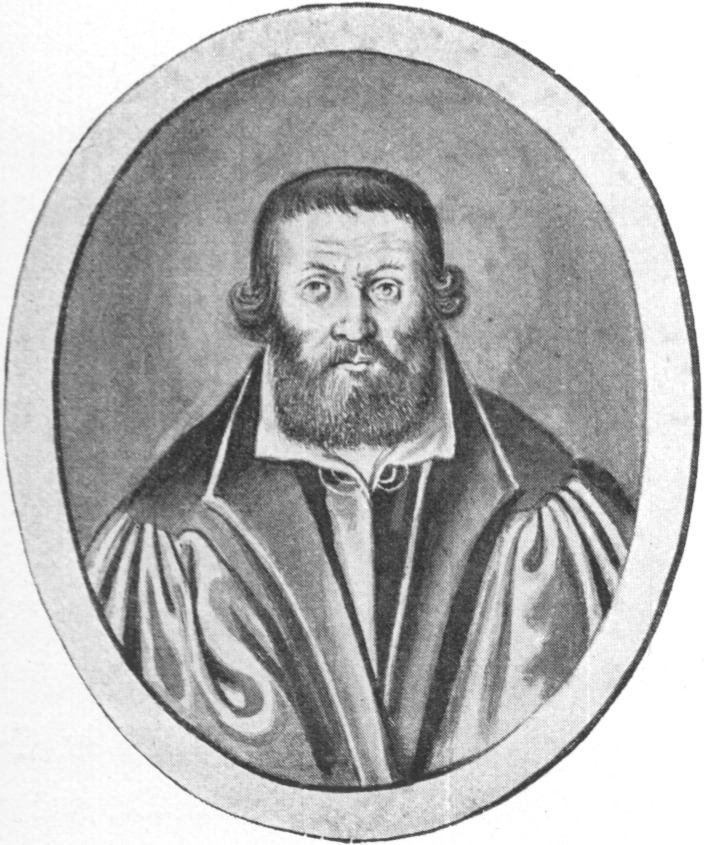 Johann Heß (1490-1547), Miniaturkopie eines 1757 zerstörten Gemäldes aus der Bibliothek der Magdalenenkirche Breslau, weiß gehöhte Sepia-Tuschezeichnung